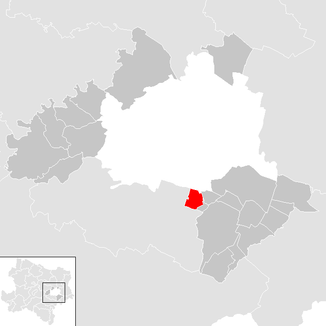 Bezirk Wien Umgebung